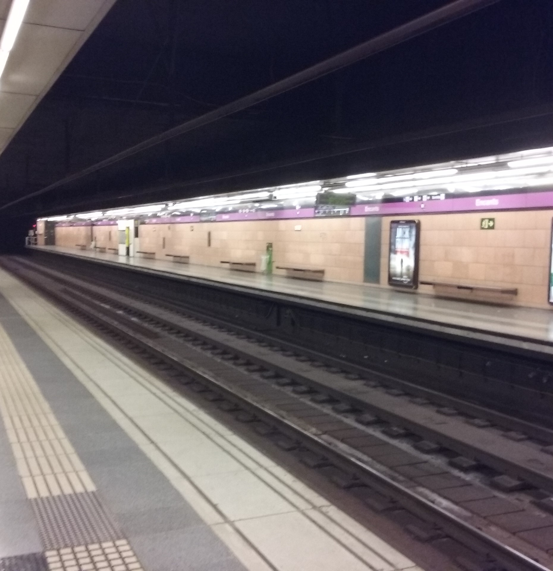 Encants - Estació del Metro de Barcelona